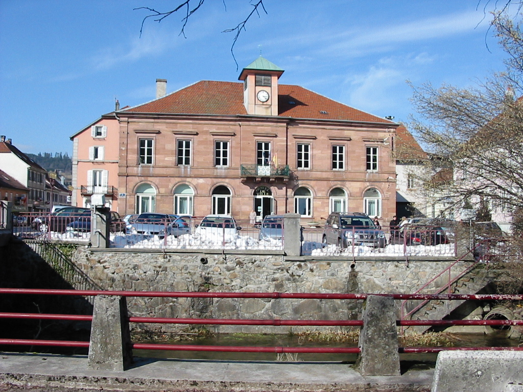 La mairie de Fraize, commune des Vosges, au bord de la Meurthe.